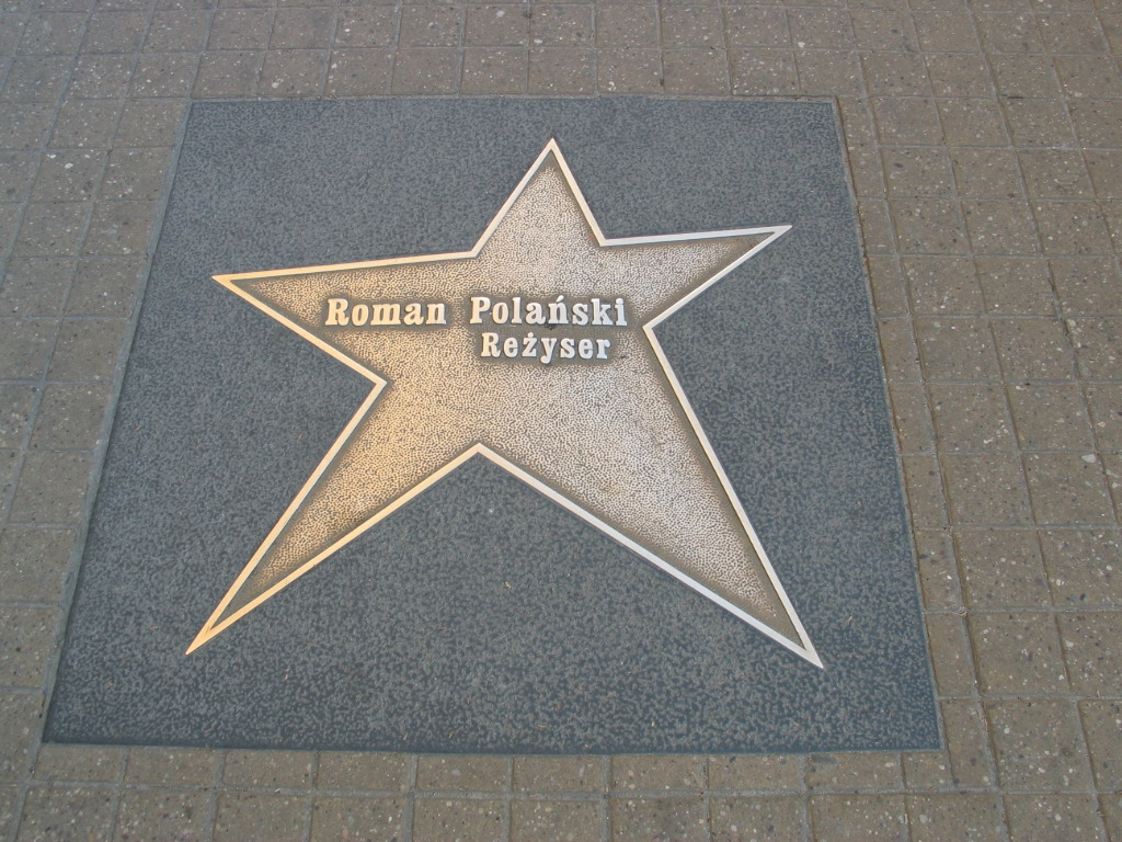 Łódź Walk of Fame - Roman Polański (Roman Polanski)